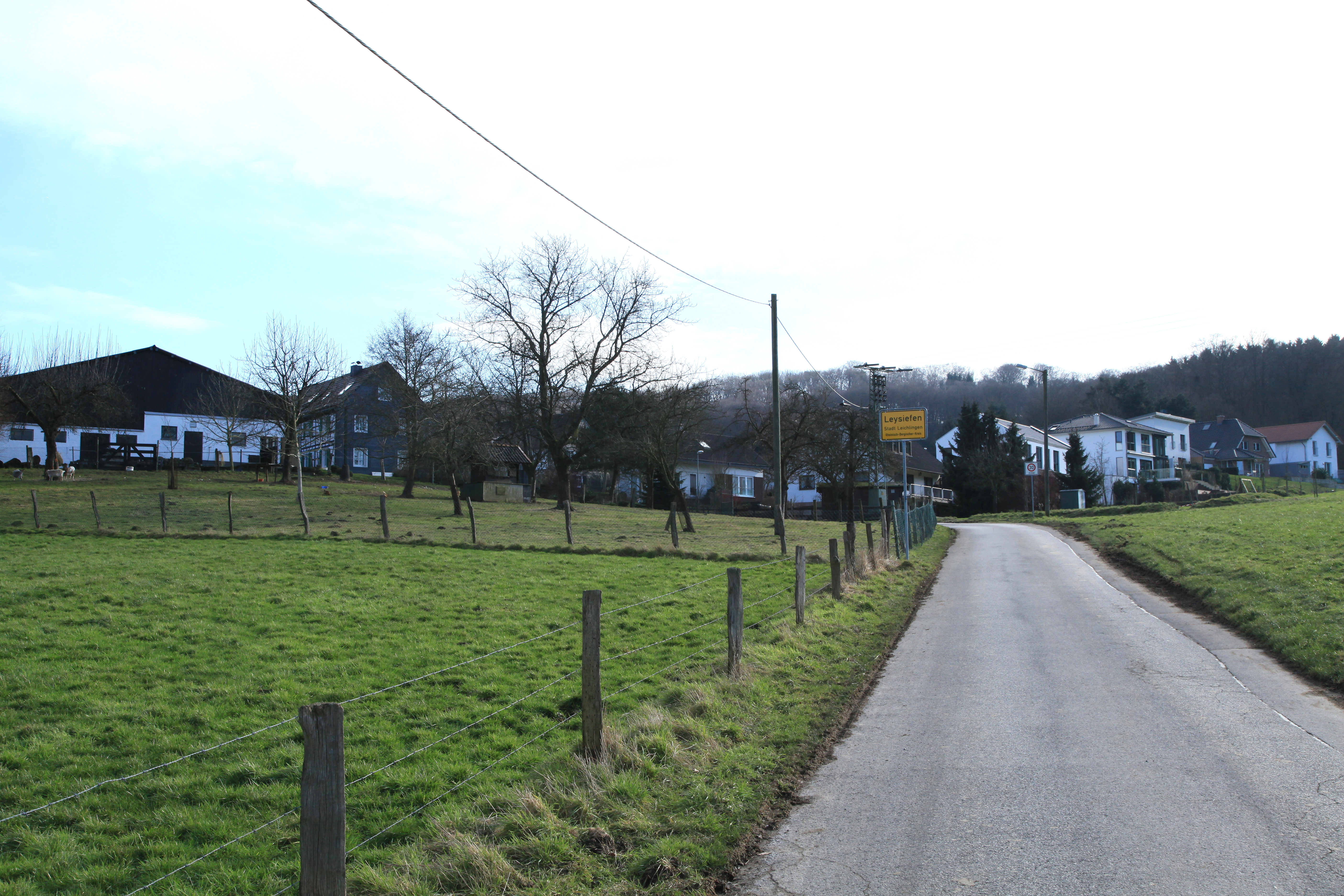 Ortsteil Leysiefen an der Straße Leysiefen in Leichlingen